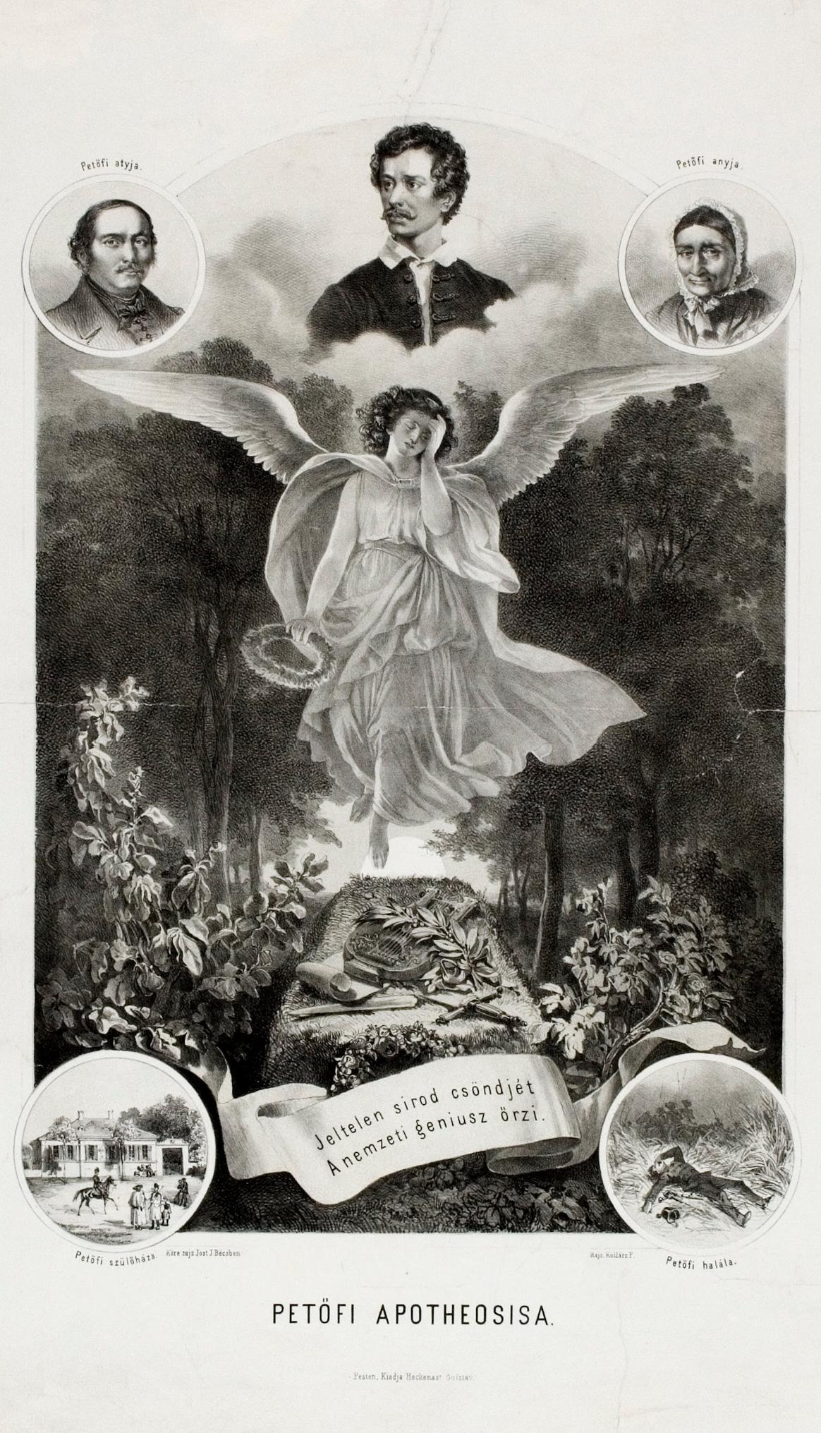 Franz Kollarž (1829–1894) rajza, Petőfi apotheosisa